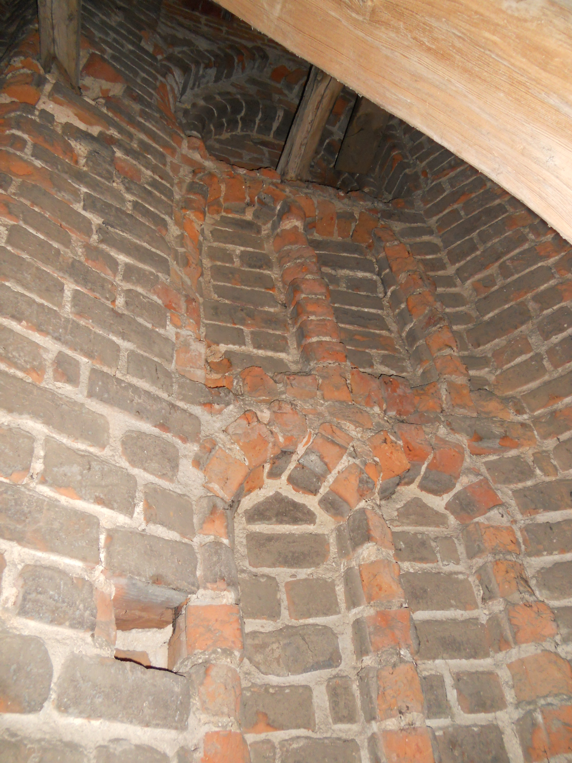 Pod dachem kolegiaty zachowała się nieprzebudowana ściana szczytowa z okresu średniowiecza.